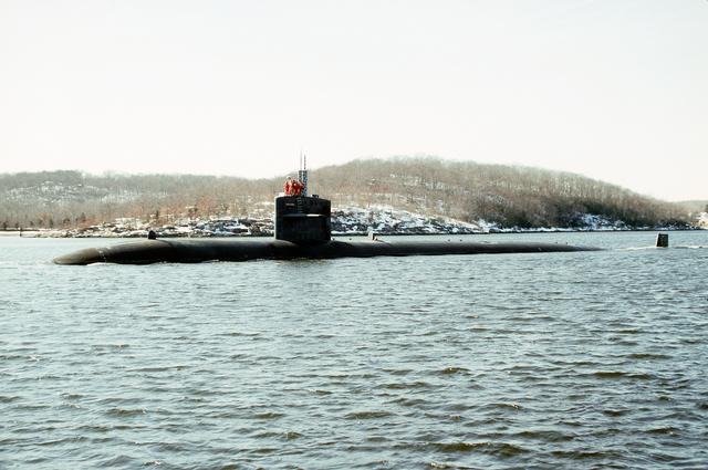 USS Minneapolis-St. Paul (SSN-708)